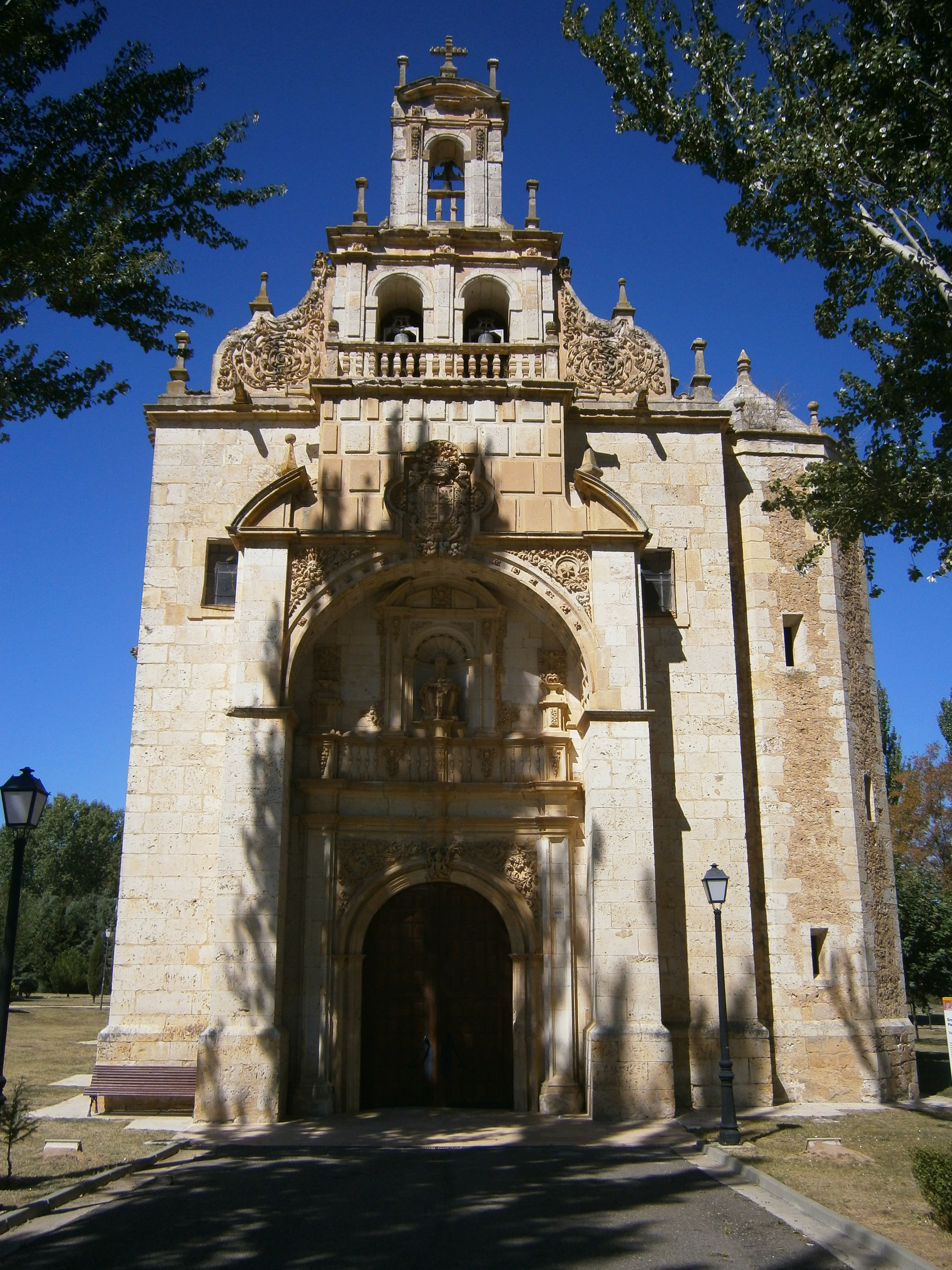 Ermita de la Santísima Trinidad o del Padre Eterno (Fuentespina)